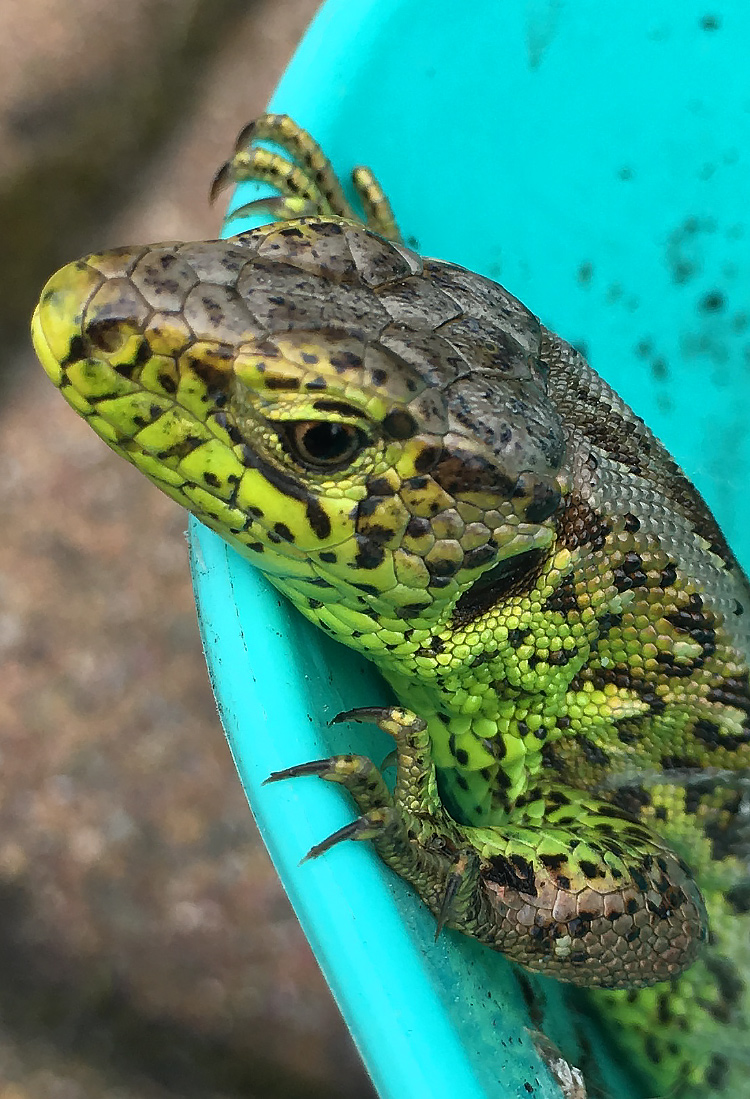 Jaszczurka zwinka w ogrodzie